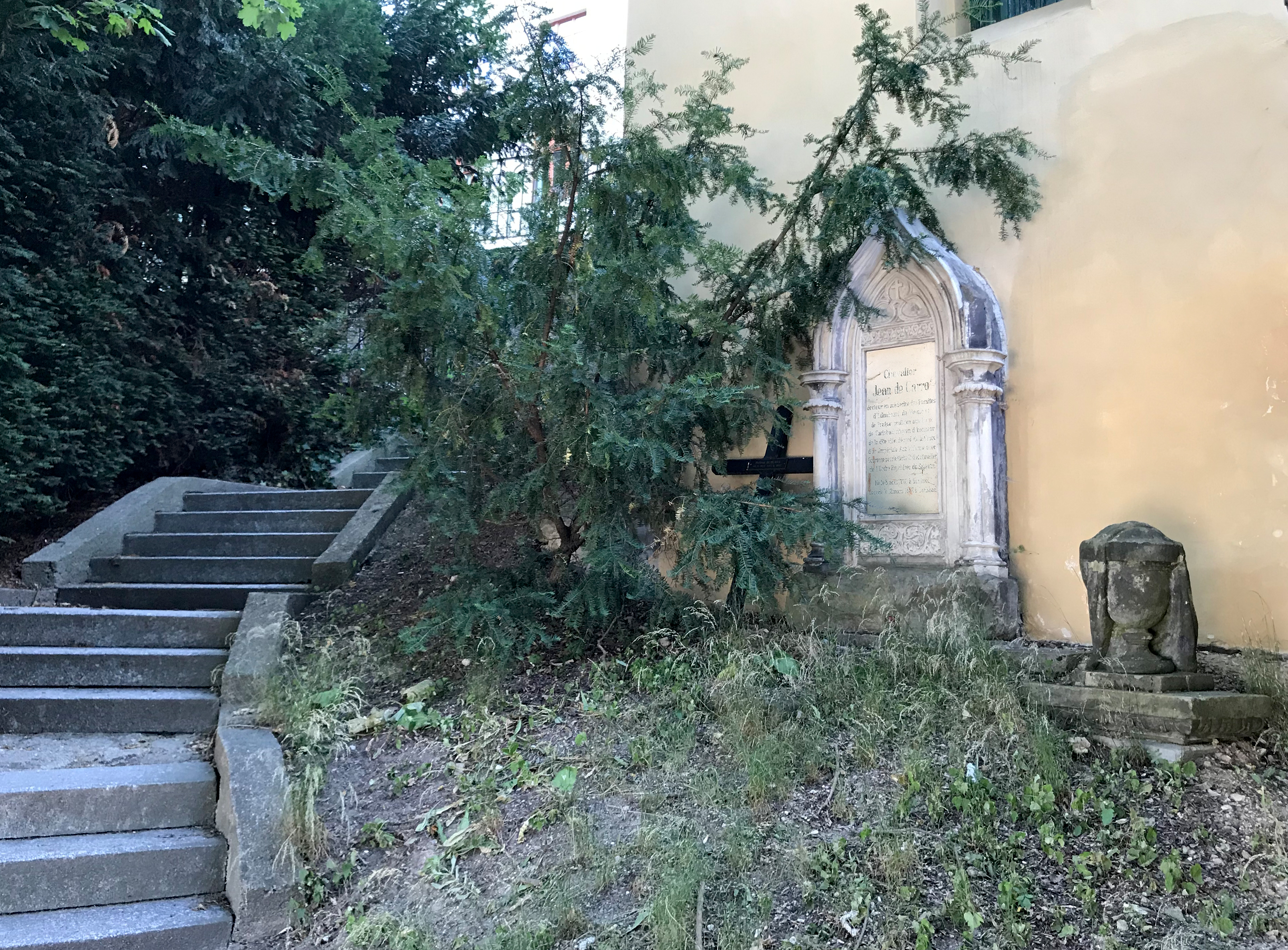 Hrob Jeana de Carro v Karlových Varech v Mozartových sadech u zdi kostela sv. Ondřeje